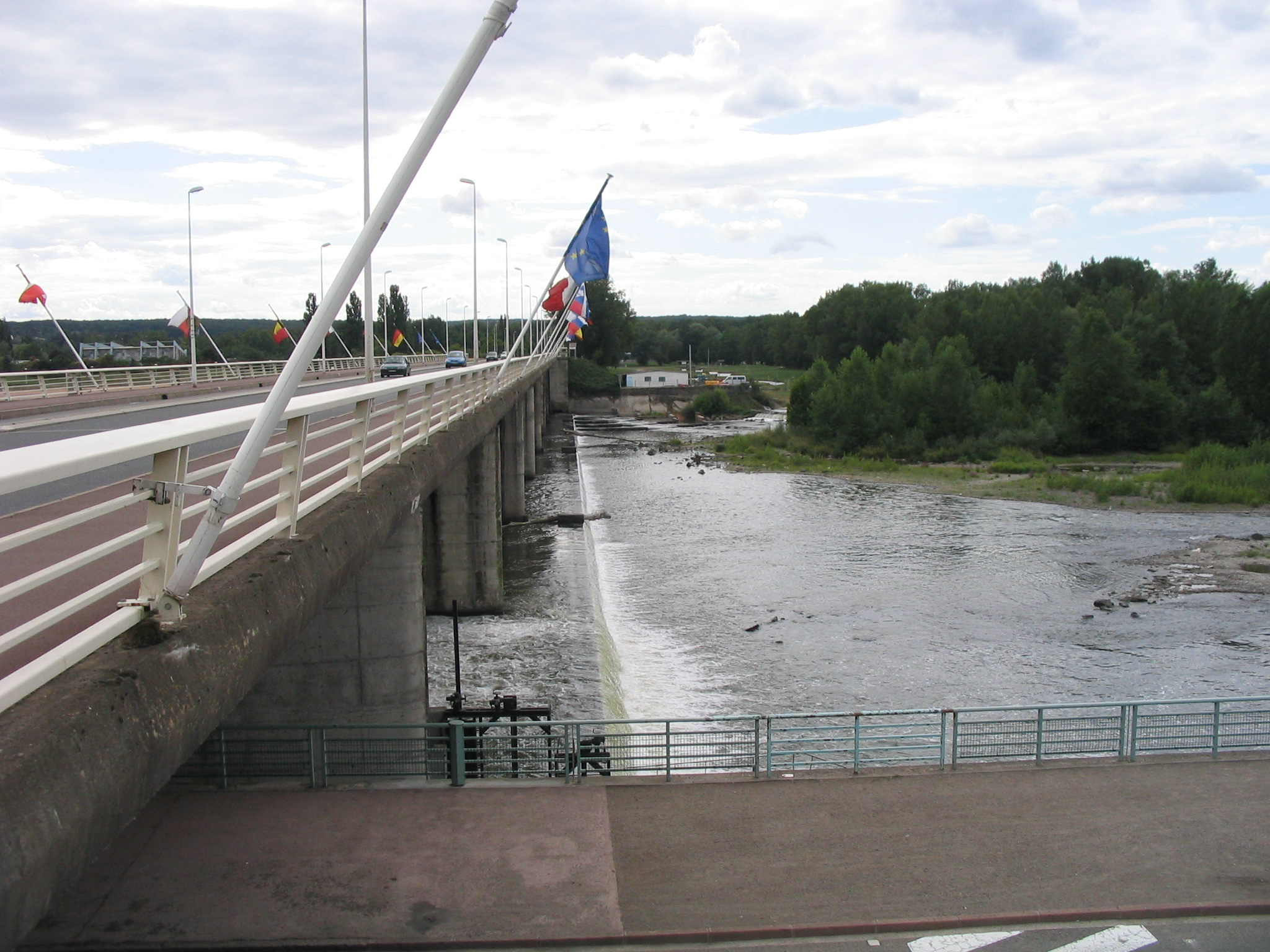 Le pont de l'Europe qui enjambe l'Allier, dans le nord de Vichy.